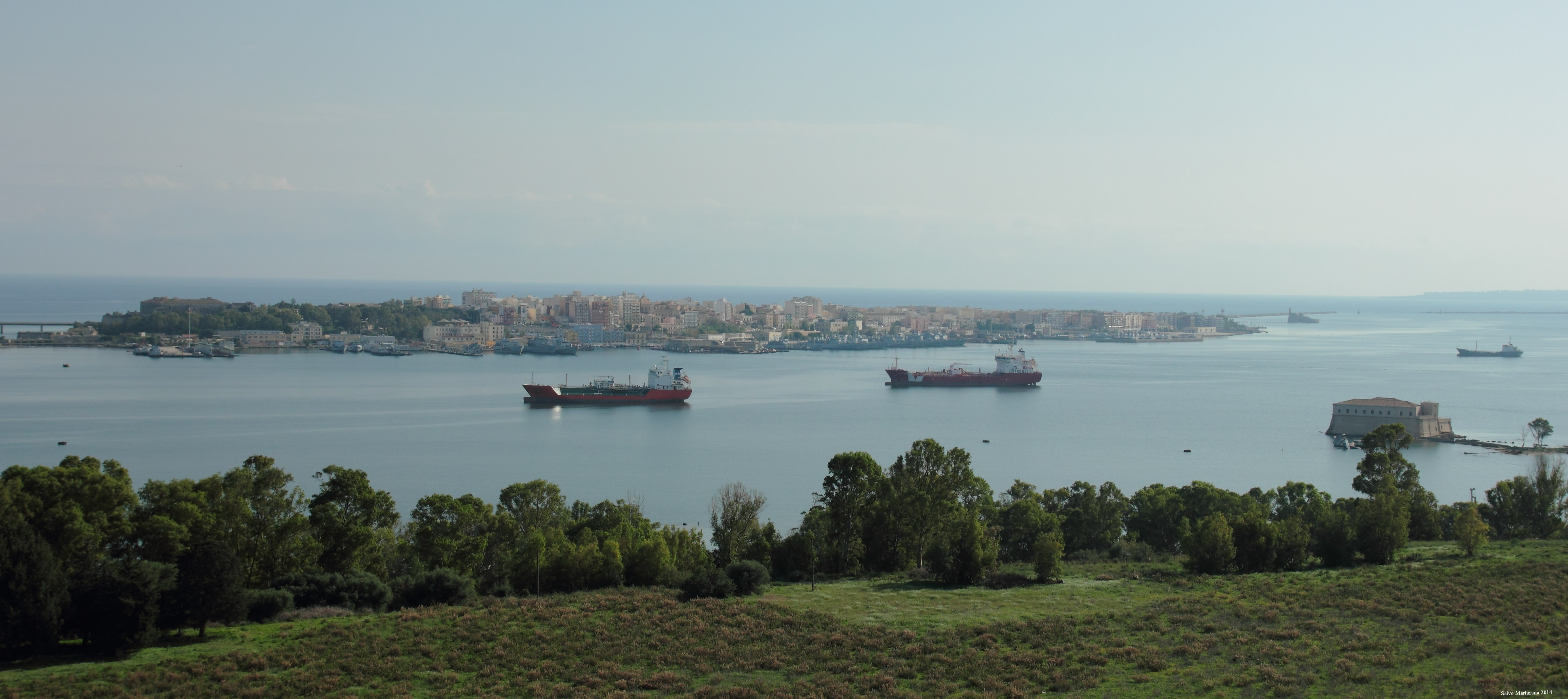 veduta da hangar per dirigibili Augusta